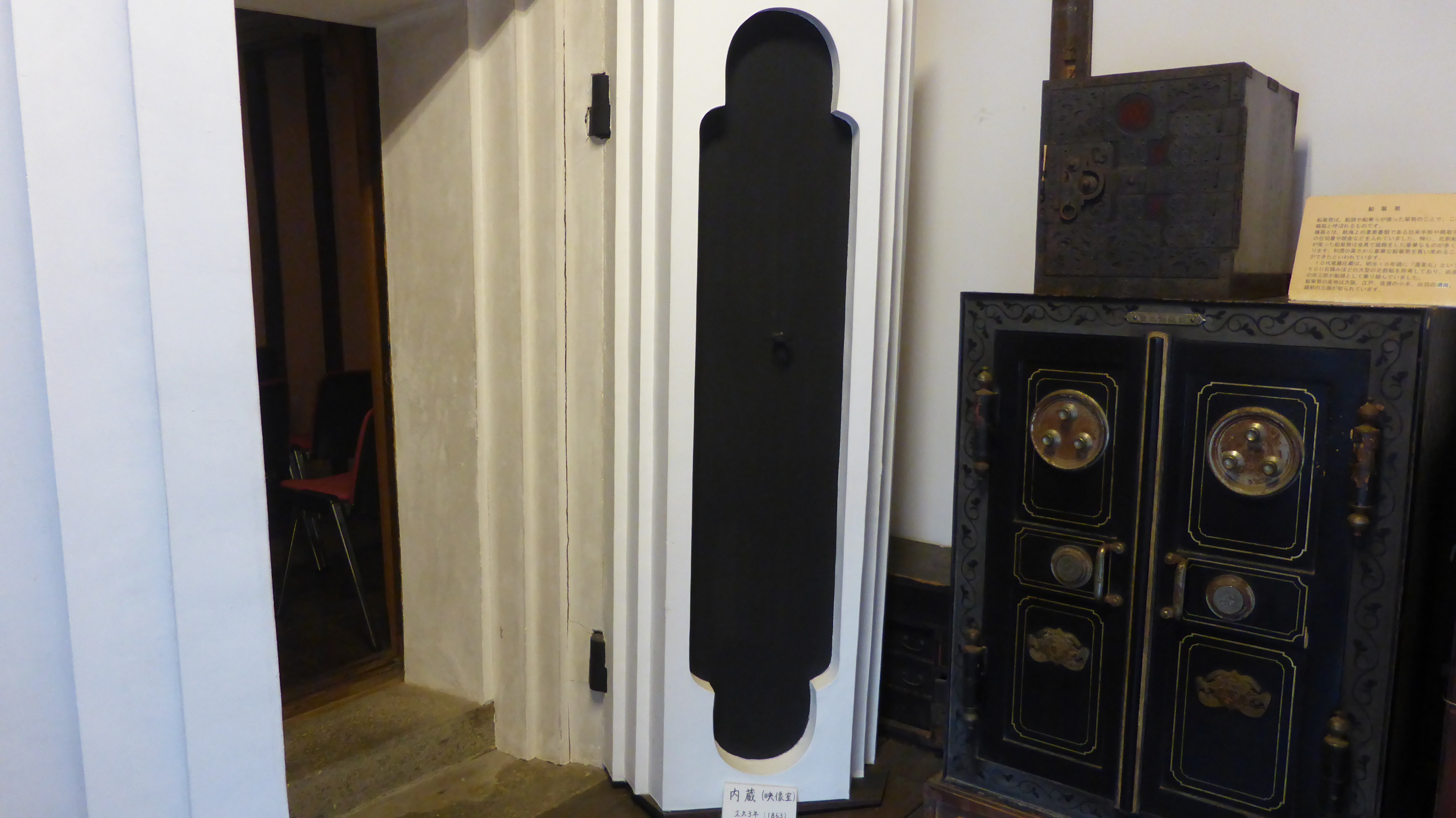 2019.10.13撮影 左の内蔵は映写室となっている。右は船箪笥。